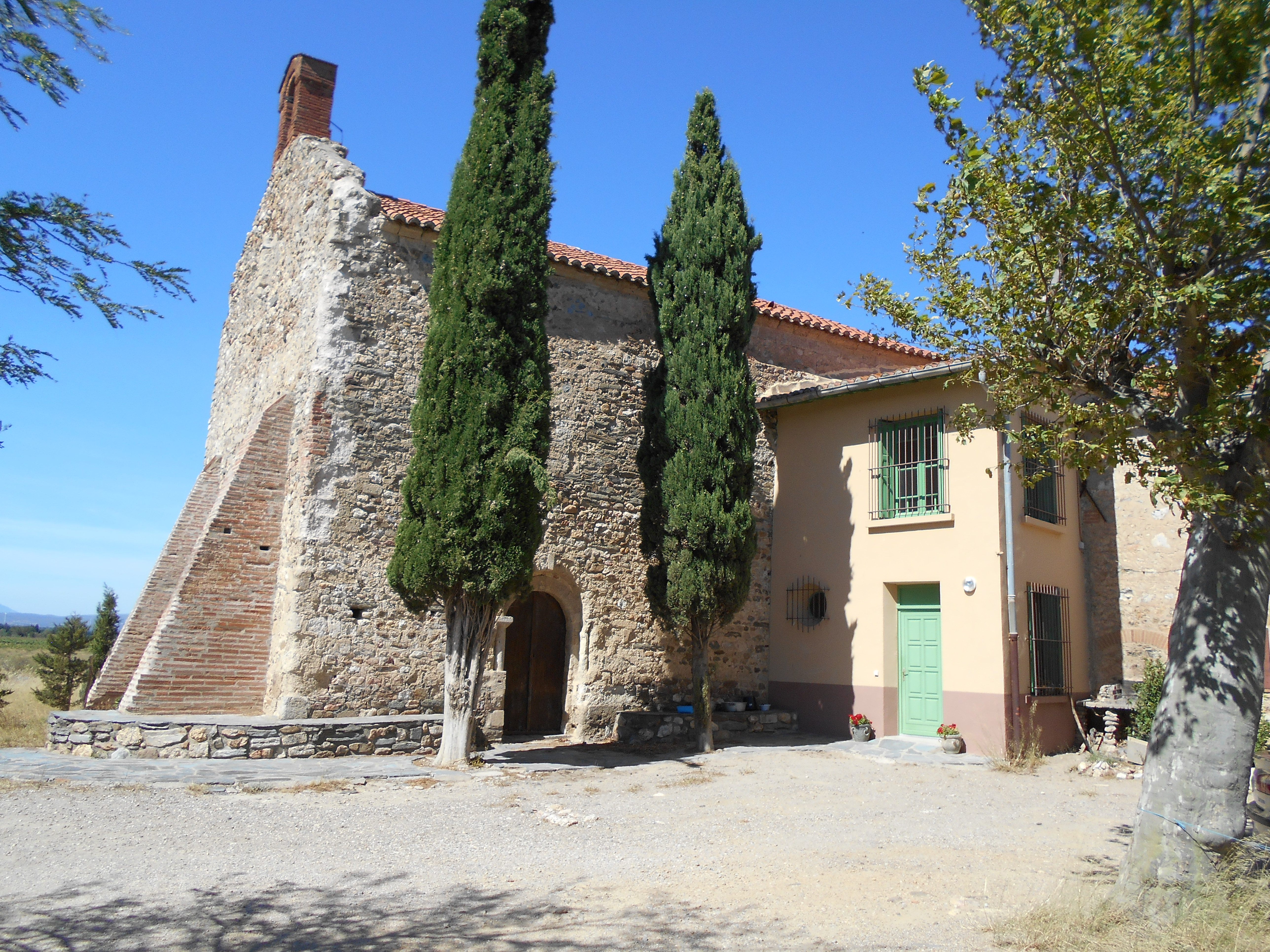 Façana de migdia.